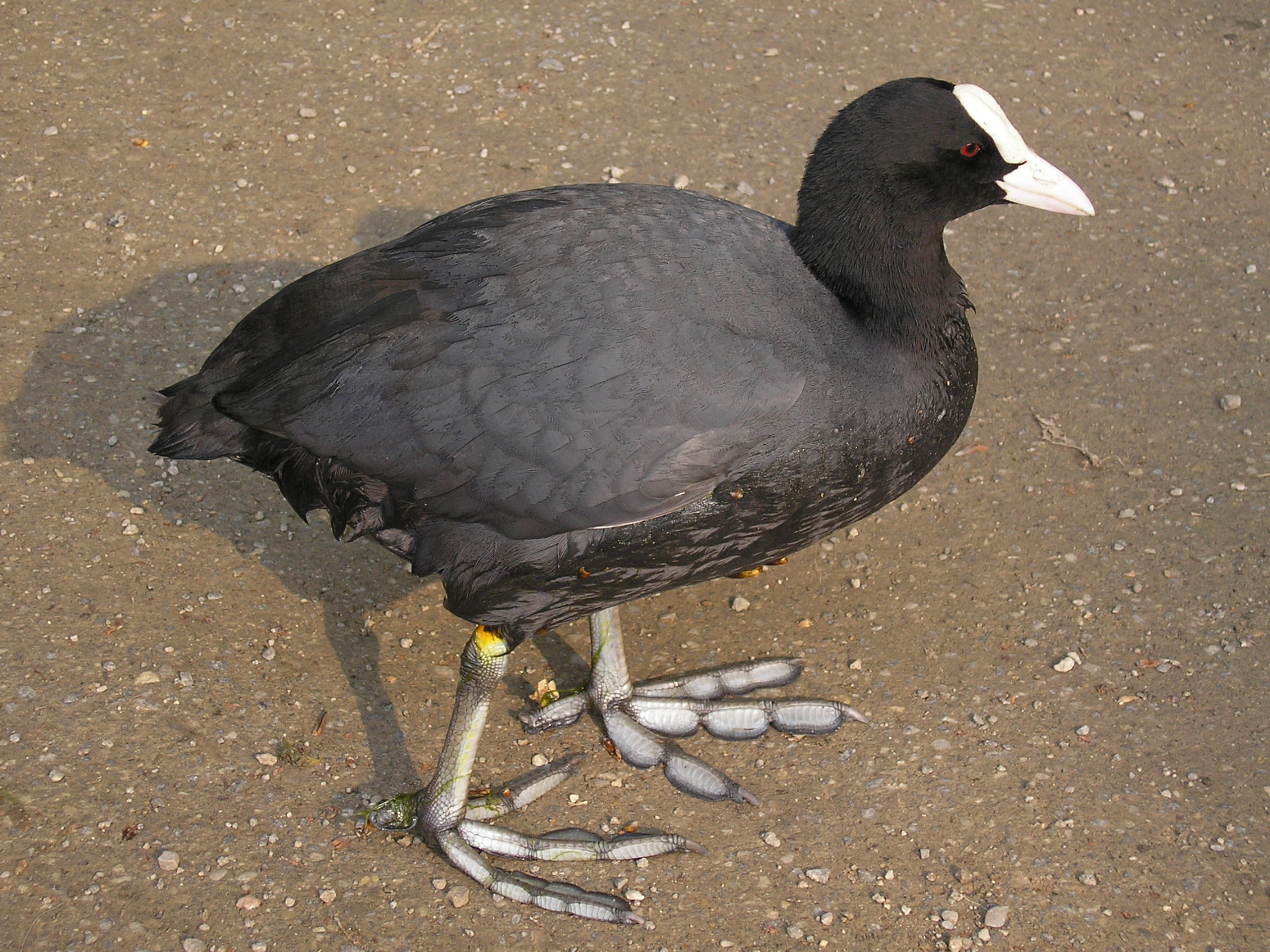 Blässhuhn am Adenauer-Weiher in Köln-Lindenthal.